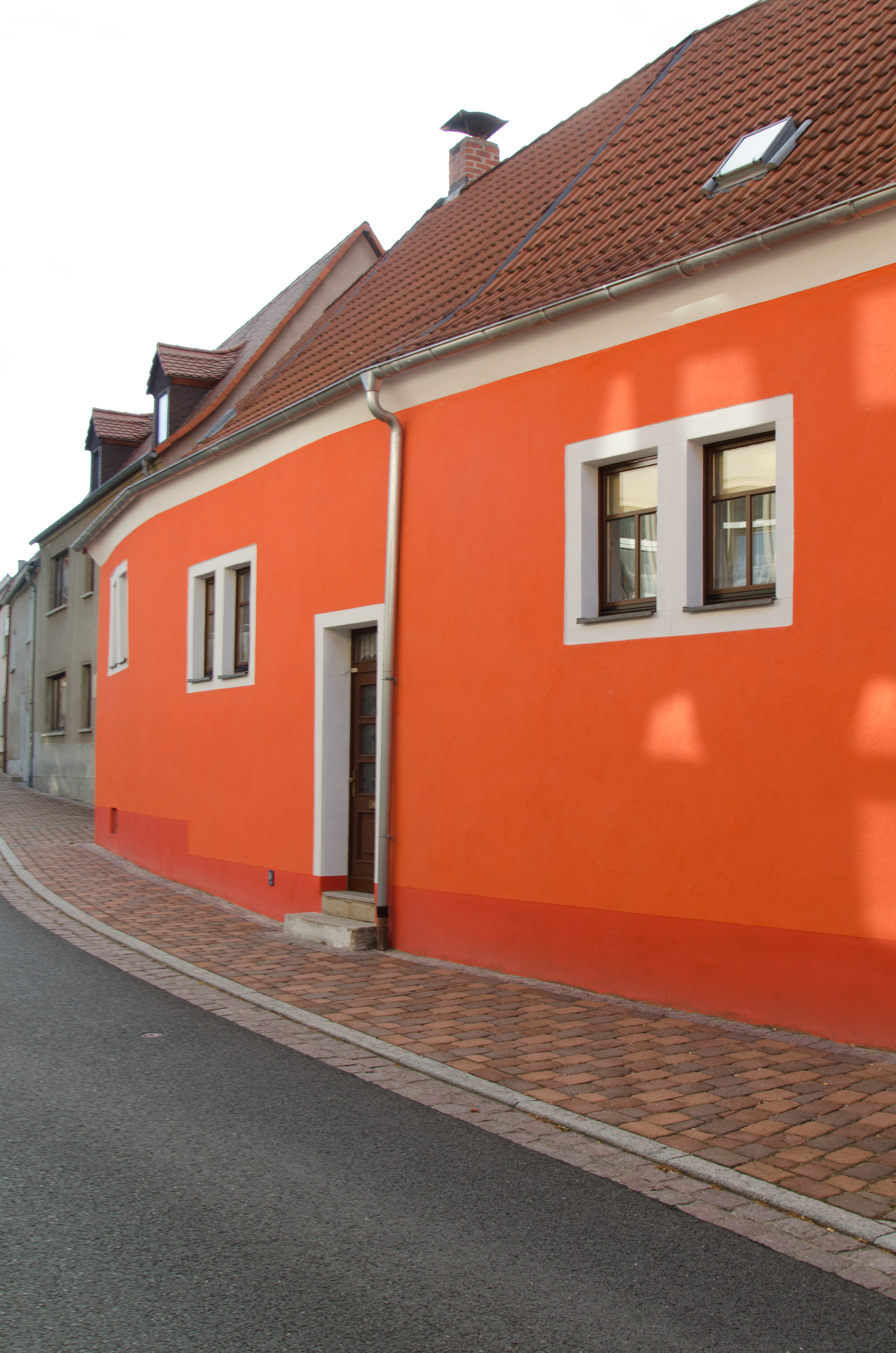 Querfurt, Lederberg 30